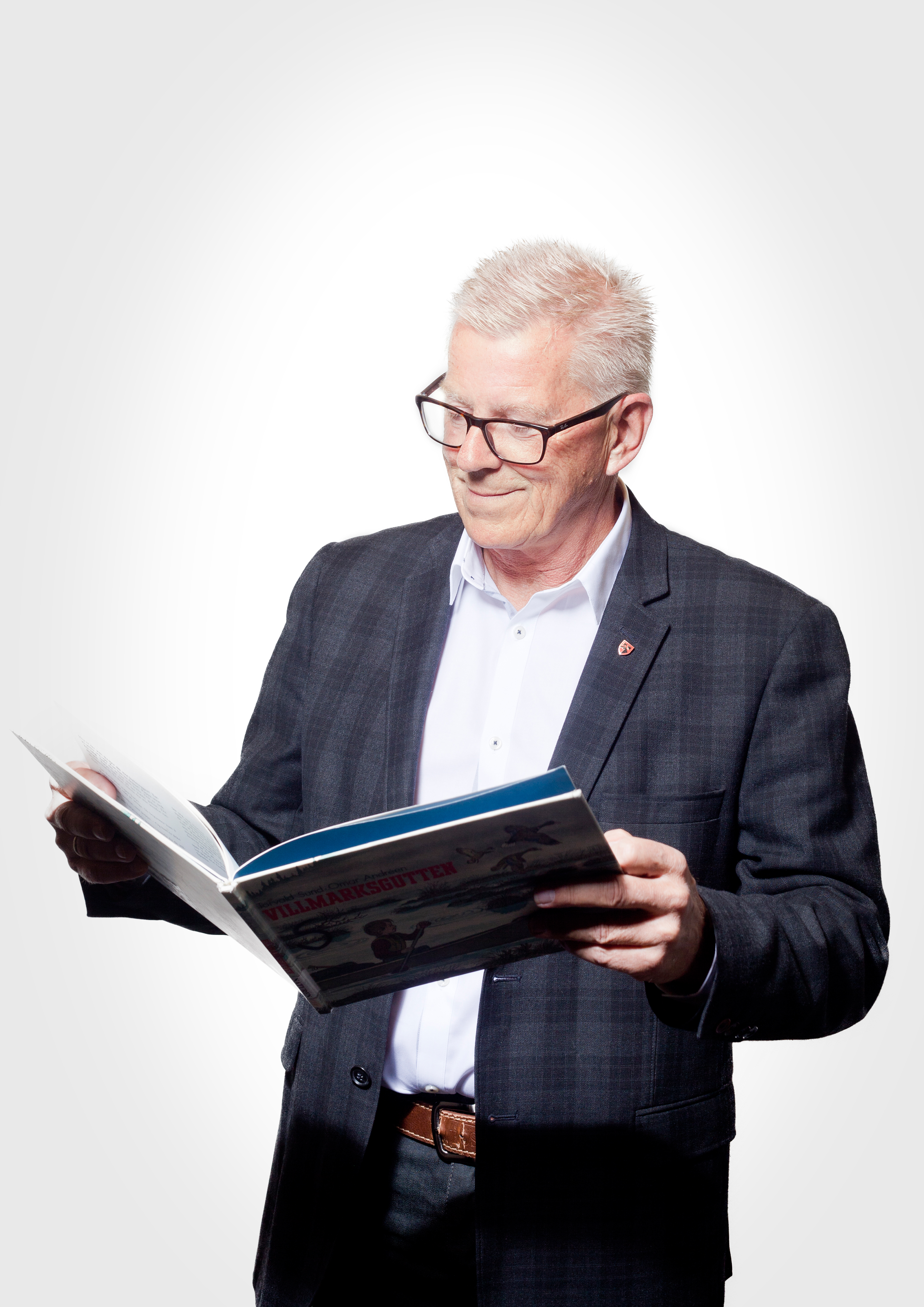 Ordfører Morten Stene fra Namsos, Nord-Trøndelag. Bildet er tatt i forbindelse med Nord-Trøndelag fylkesbiblioteks kampanje "Leseambassadører"